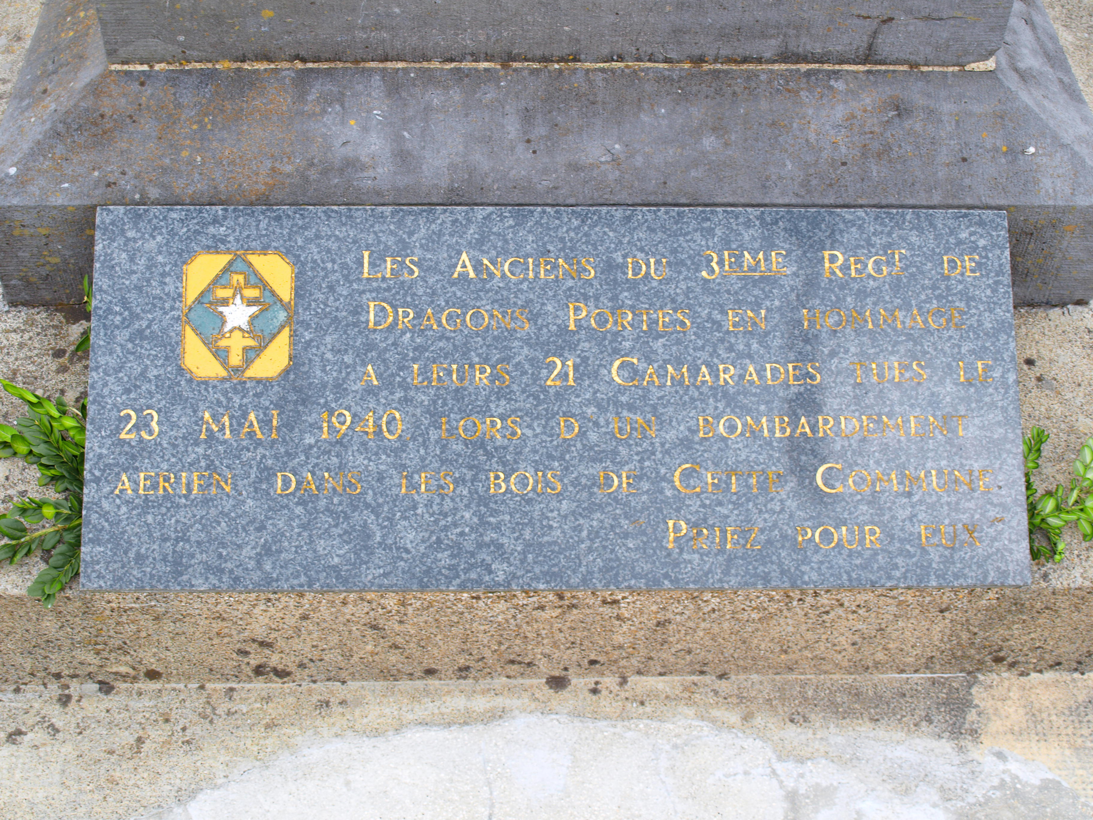 Boult-aux-Bois (Ardennes, France) ; monument aux morts , plaque commémorative aux dragons morts dans un bombardement le 23 mai 1940.